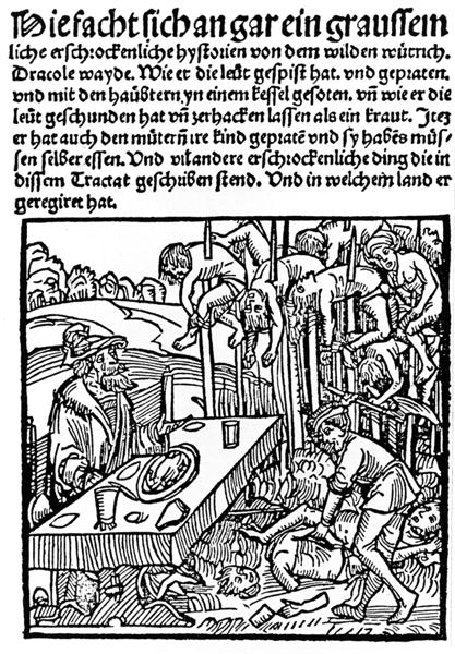 Woodcut from the title page of a 1499 pamphlet published by Markus Ayrer in Nuremberg. It depicts Vlad III "the Impaler" (identified as Dracole wyade = Draculea voivode) dining among the impaled corpses of his victims. Original caption: Hie facht sich an ein graussemliche erschrockenliche hystorien von dem wilden wütrich Dracole wayde. Wie er die leut gespist hat, und gepraten, und mit den haubtern in in einem kessel gesoten, und wie er die leut geschunden hat und zerhacken lassen als ein kraut. Item er hat auch den mütern ire kind gepraten und sy haben müssen selber essen. Und vil andere erschrockenliche ding die in dissem Tractat geschriben stend. Und in welchem land er geregiret hat.